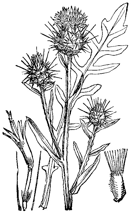 Slika 267. Bledorumeni glavinec [sic!]. (Centaúrea solstitiális.)